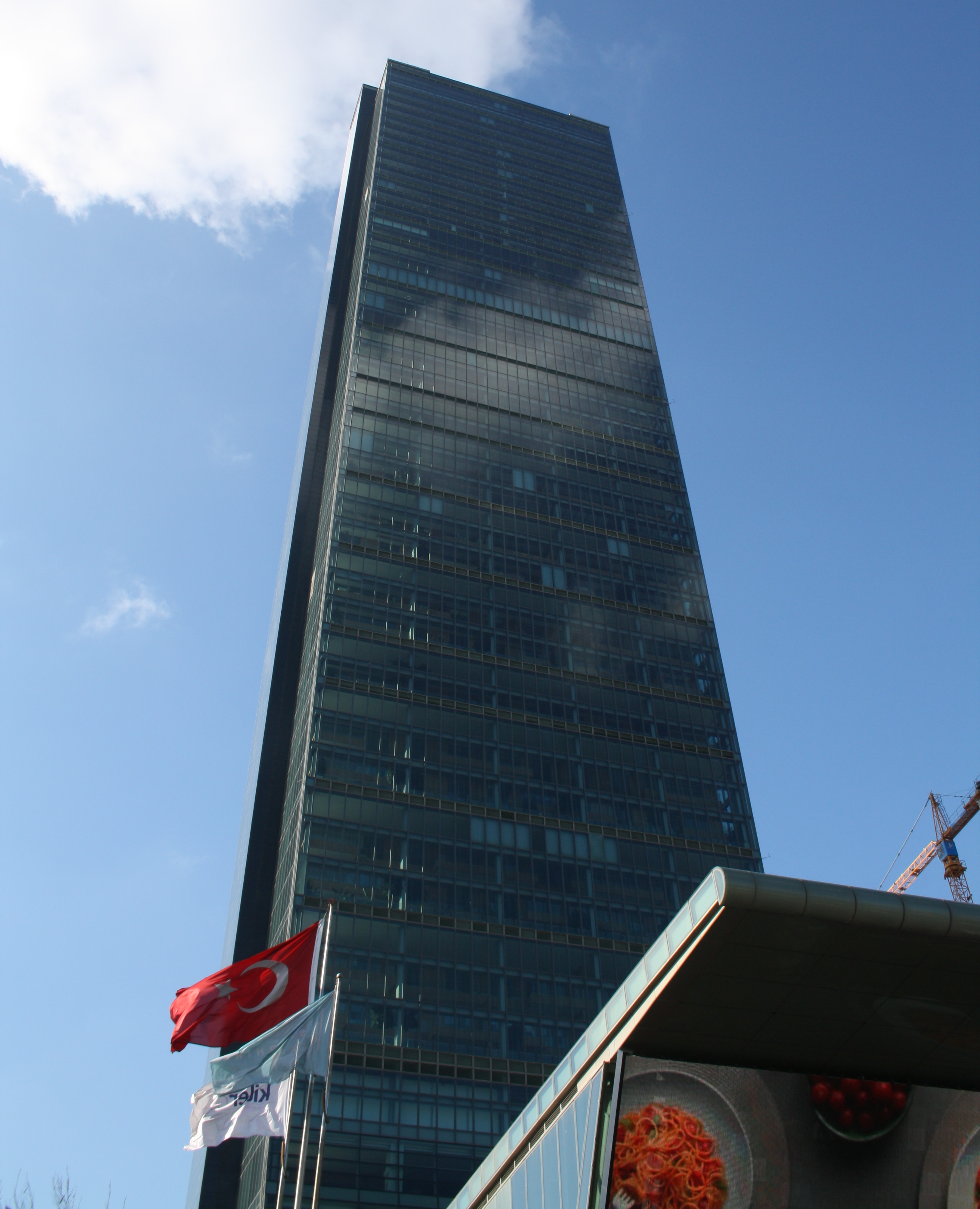 Sapphire IstanbulTürkçe: İstanbul Sapphire